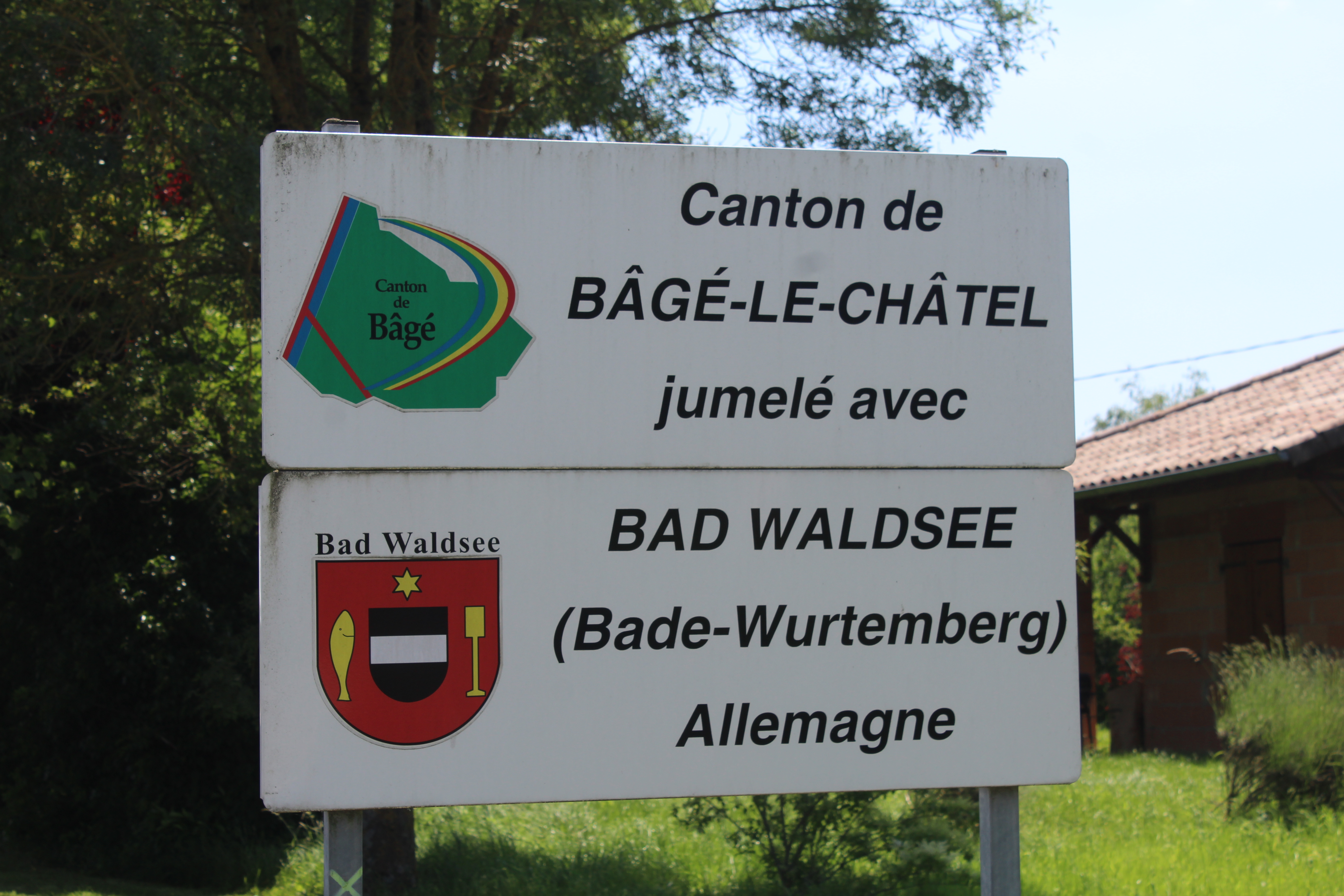 Panneau de jumelage du canton de Bâgé-le-Châtel.